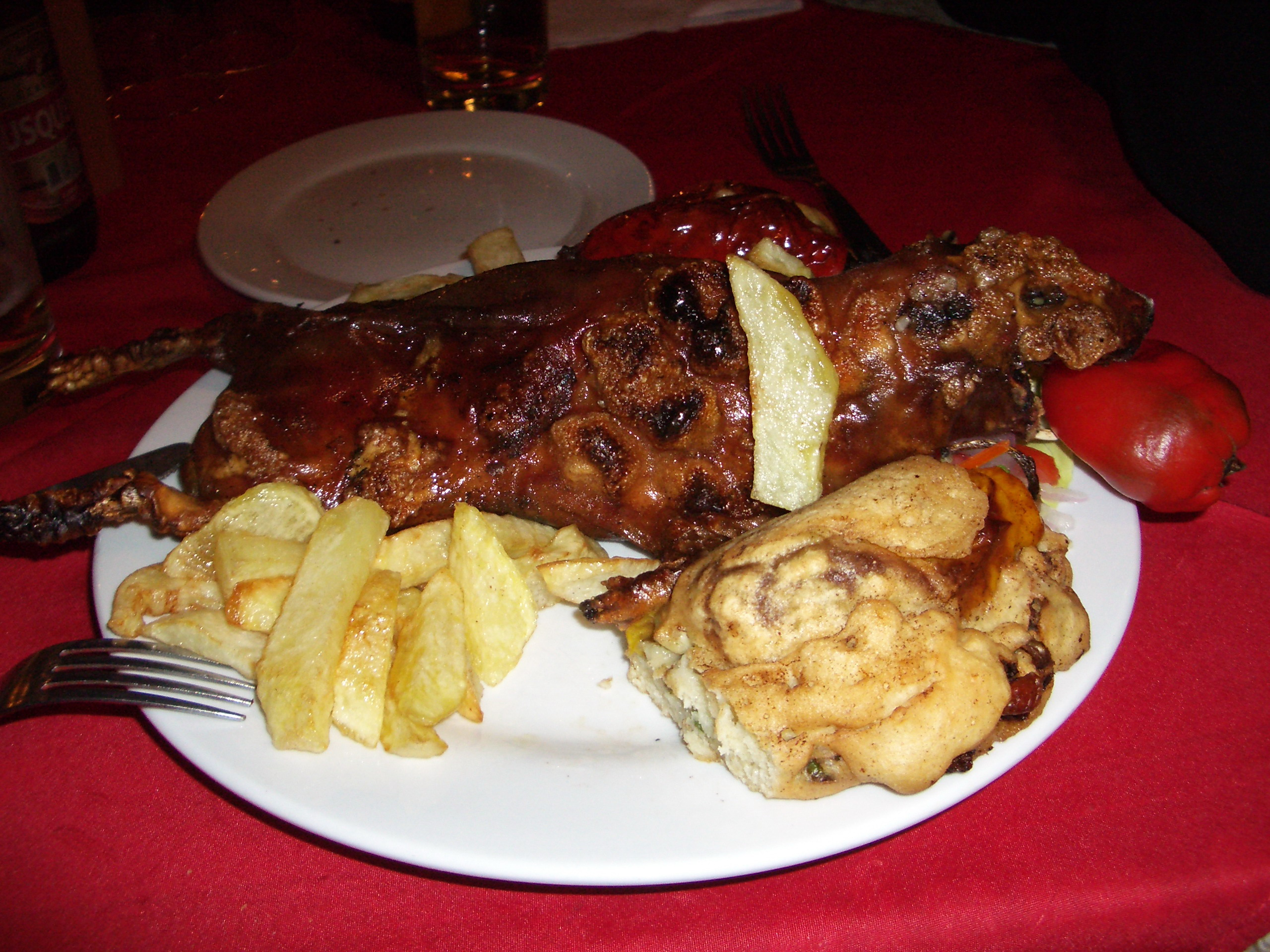 Roast guinea pig (Cavia porcellus) in Peru